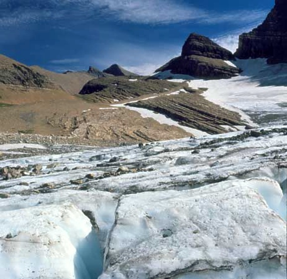 Grinnell glacier, Glacier National Park, Montana, USA.